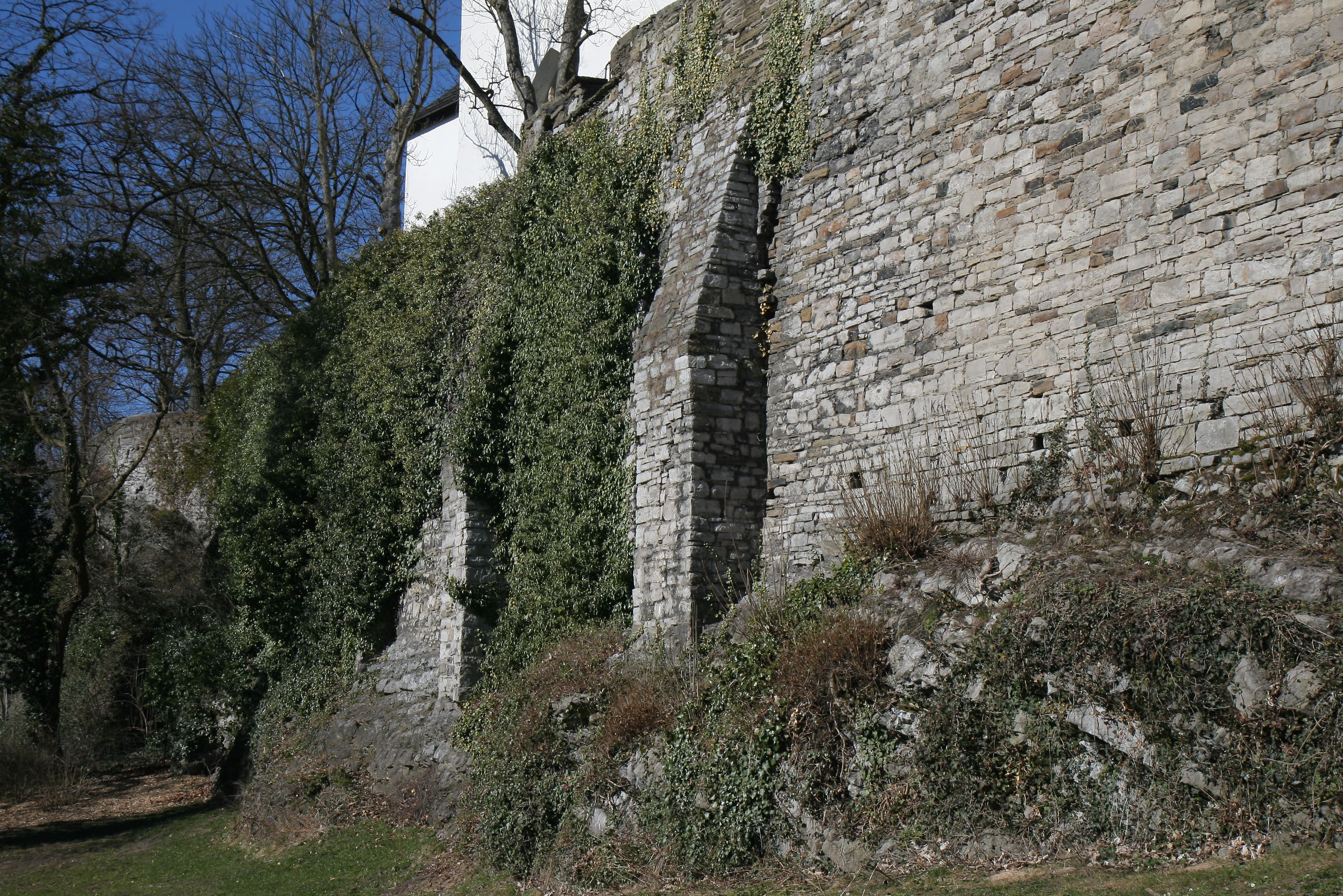 Reste der Stadtmauer in Iserlohn, Am Bilstein (unterhalb der Marienkirche). Denkmalschutz seit 30. Juni 1983.